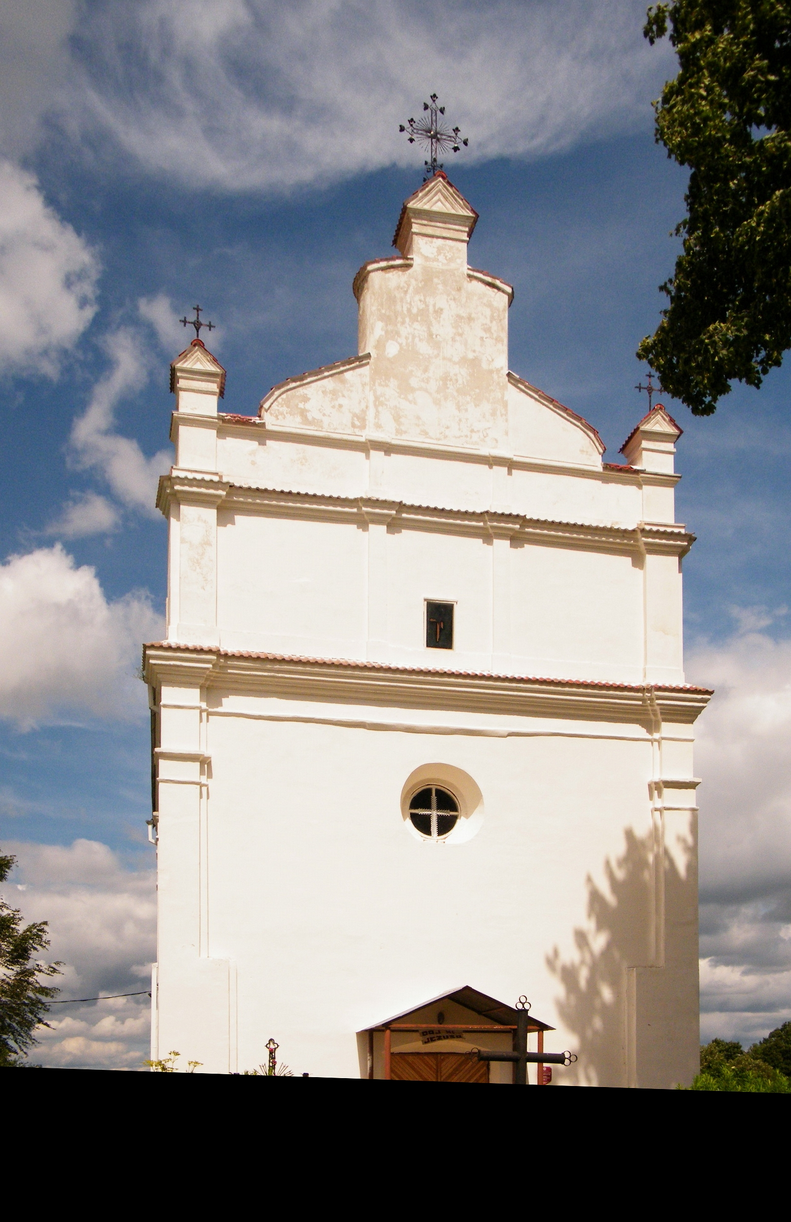 Беларуская (тарашкевіца): Касьцёл Сьв. Георгія. в. Варона This is a photo of Belarusian heritage monument. Reference number: 412Г000041 ( WLM)